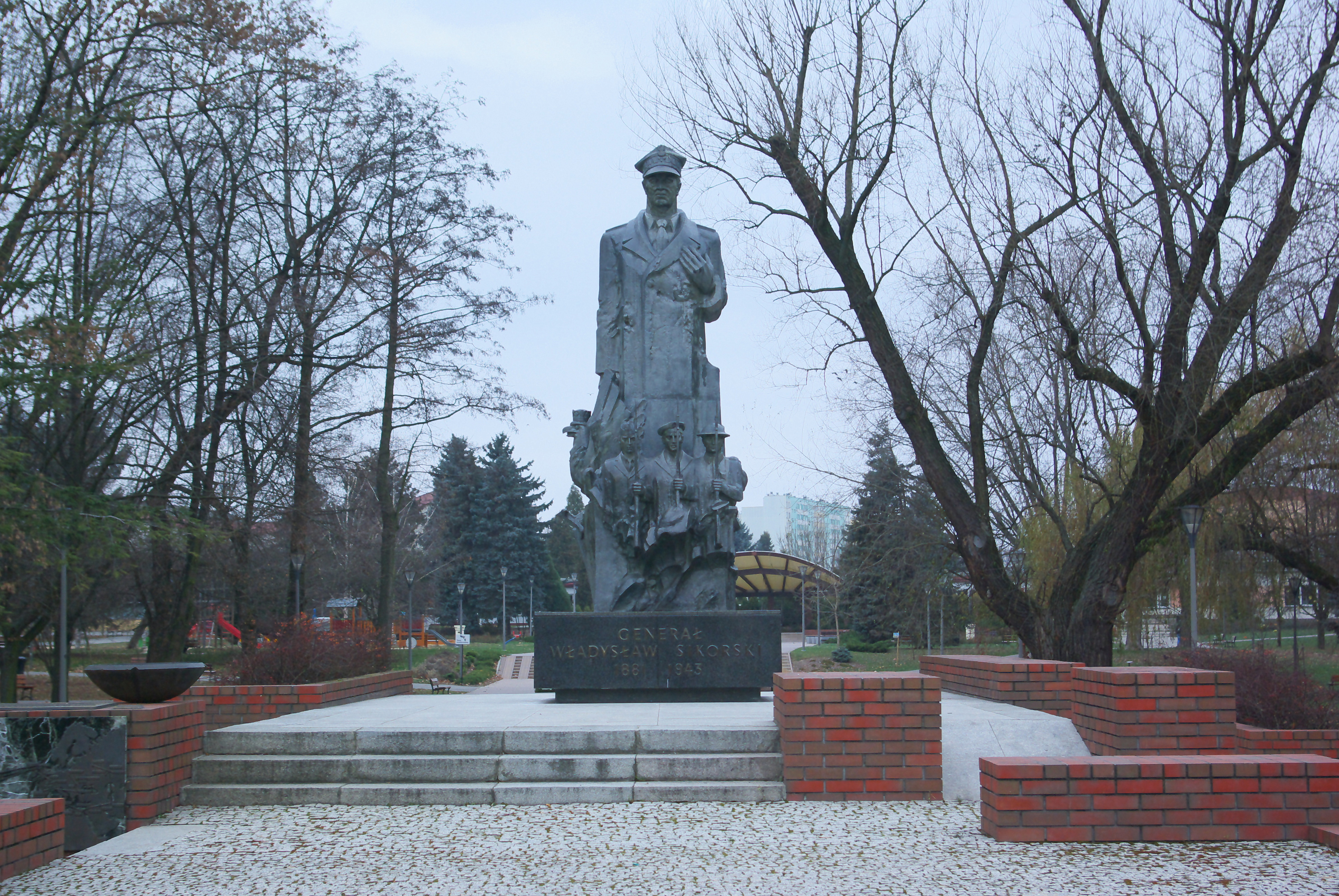 Pomnik Władysława Sikorskiego w Rzeszowie